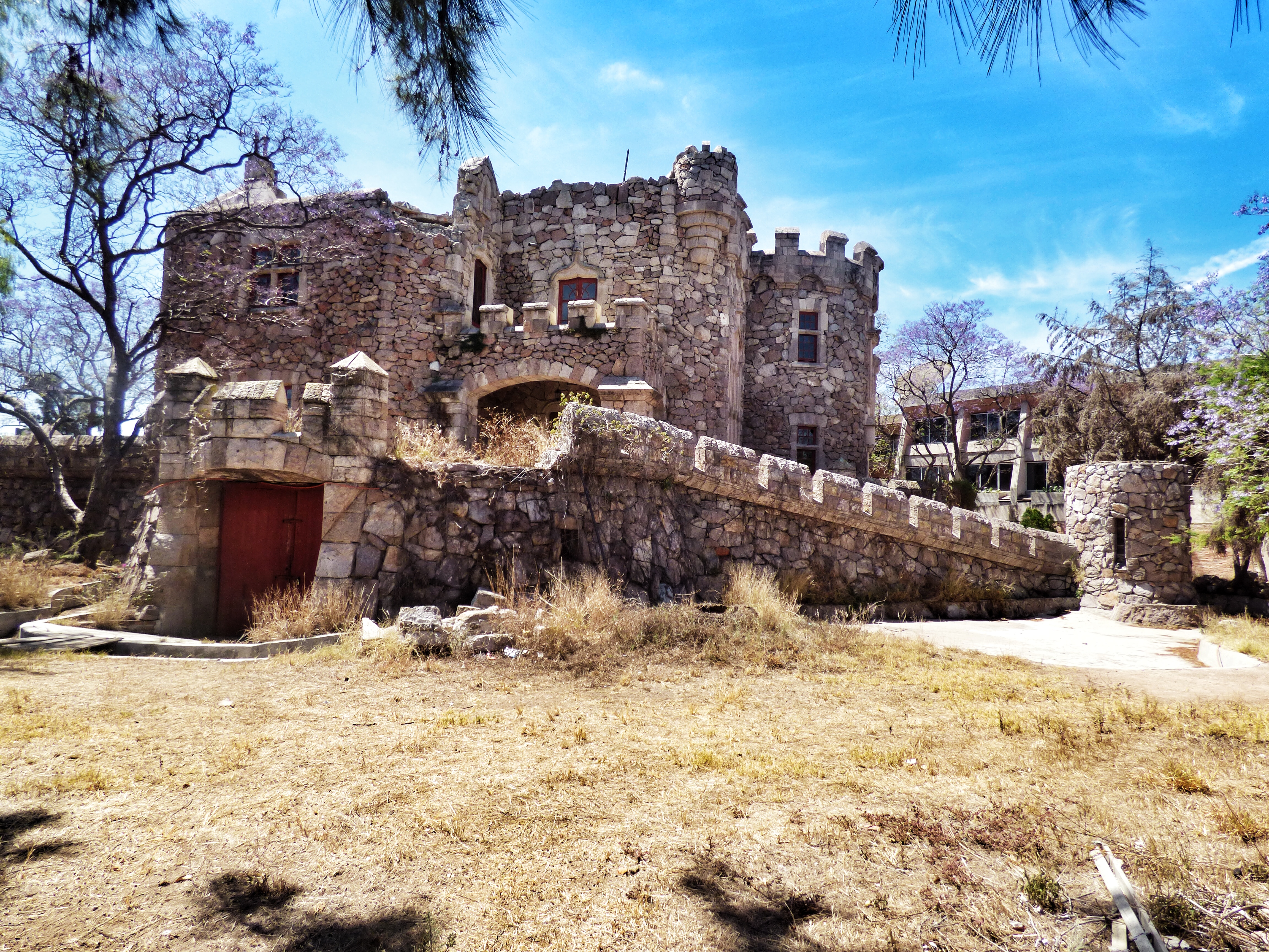 Obra de Refugio Reyes Rivas